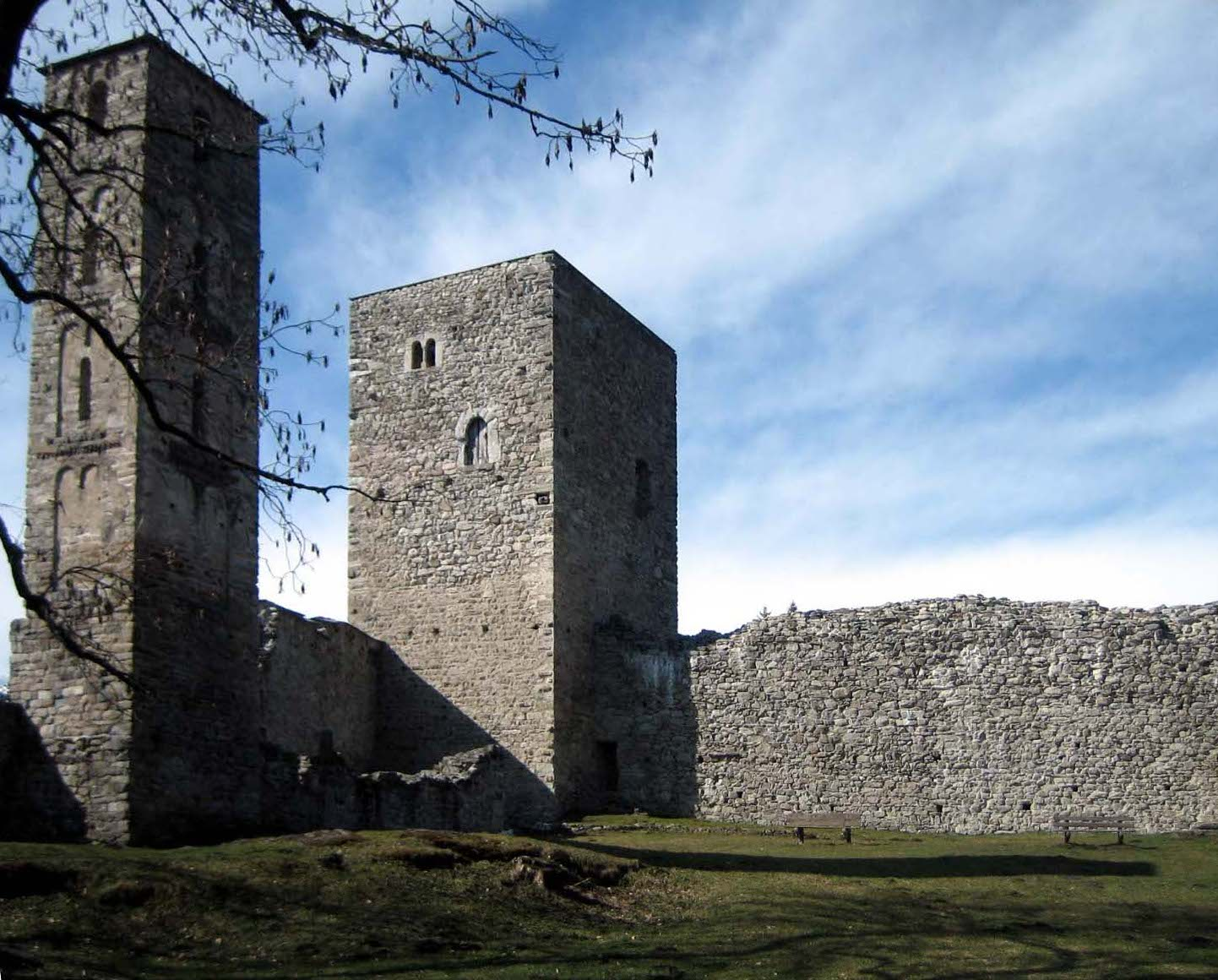 Innenhof mit Campanile und Bergfried